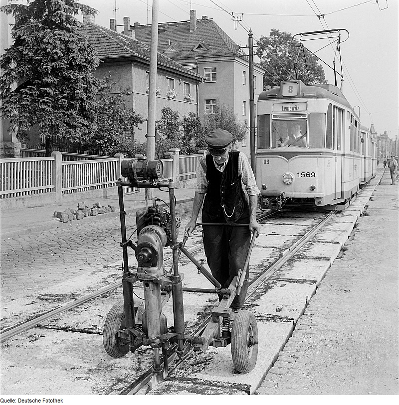 Original image description from the Deutsche FotothekDeckenschlußarbeiten beim Straßenbahngleisbau in der Warthaer Straße. Bauarbeiter mit durch Verbrennungsmotor angetriebener Fugenstampfmaschine, dahinter wartender Dreiwagenzug der Linie 8